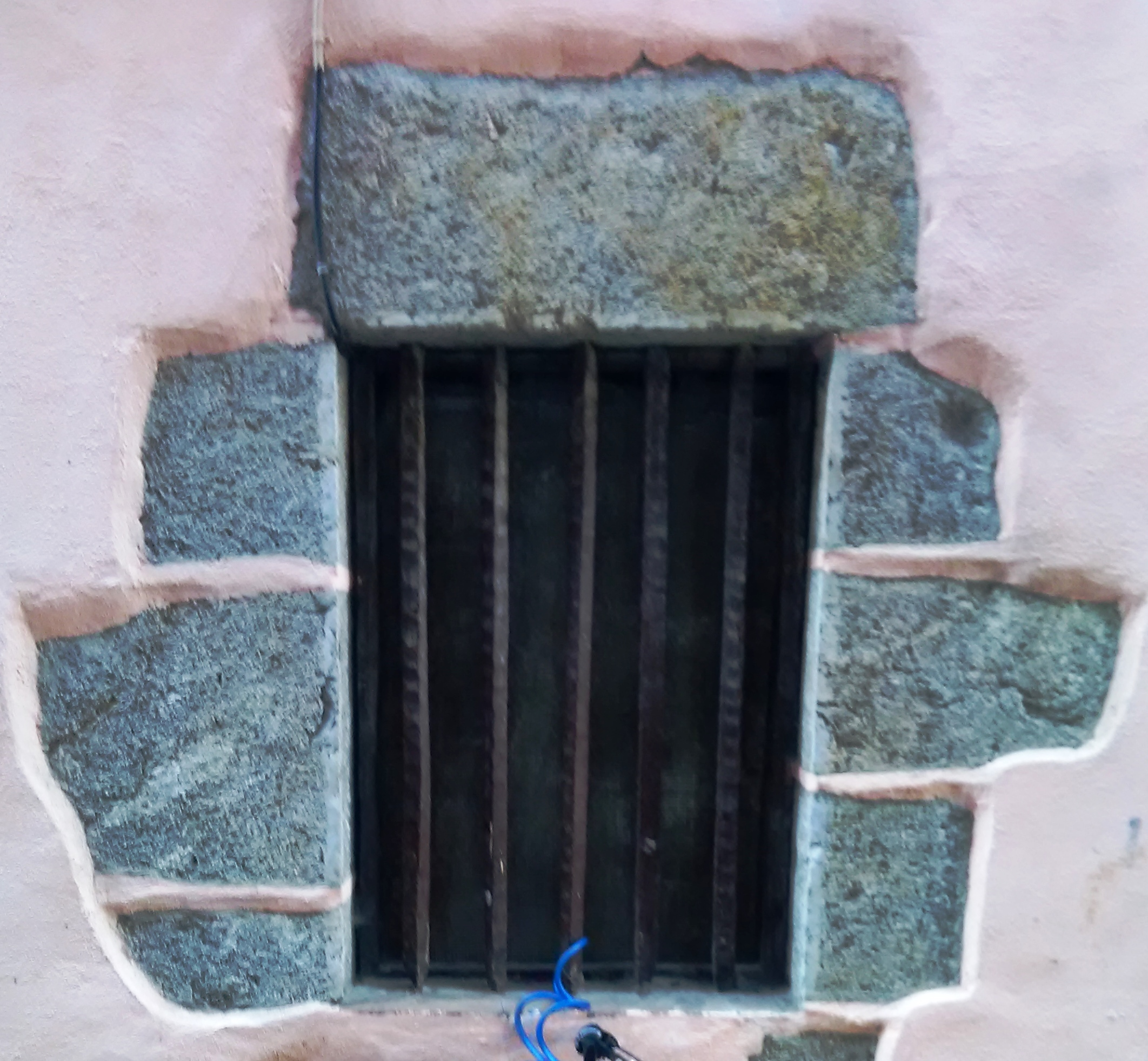 Eskuz ijeztutako barrak, Beaskokalea 1 zenbakidun etxean (Lekeitio, Bizkaia)